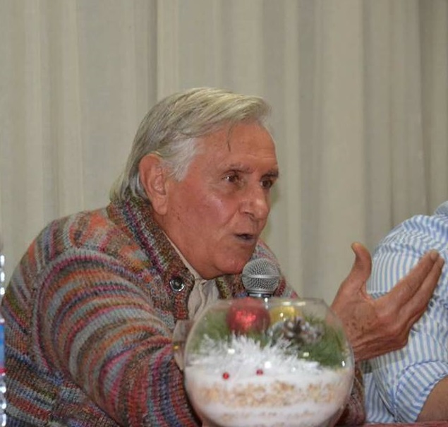 Bachisio Bandinu durante un convegno a Pattada